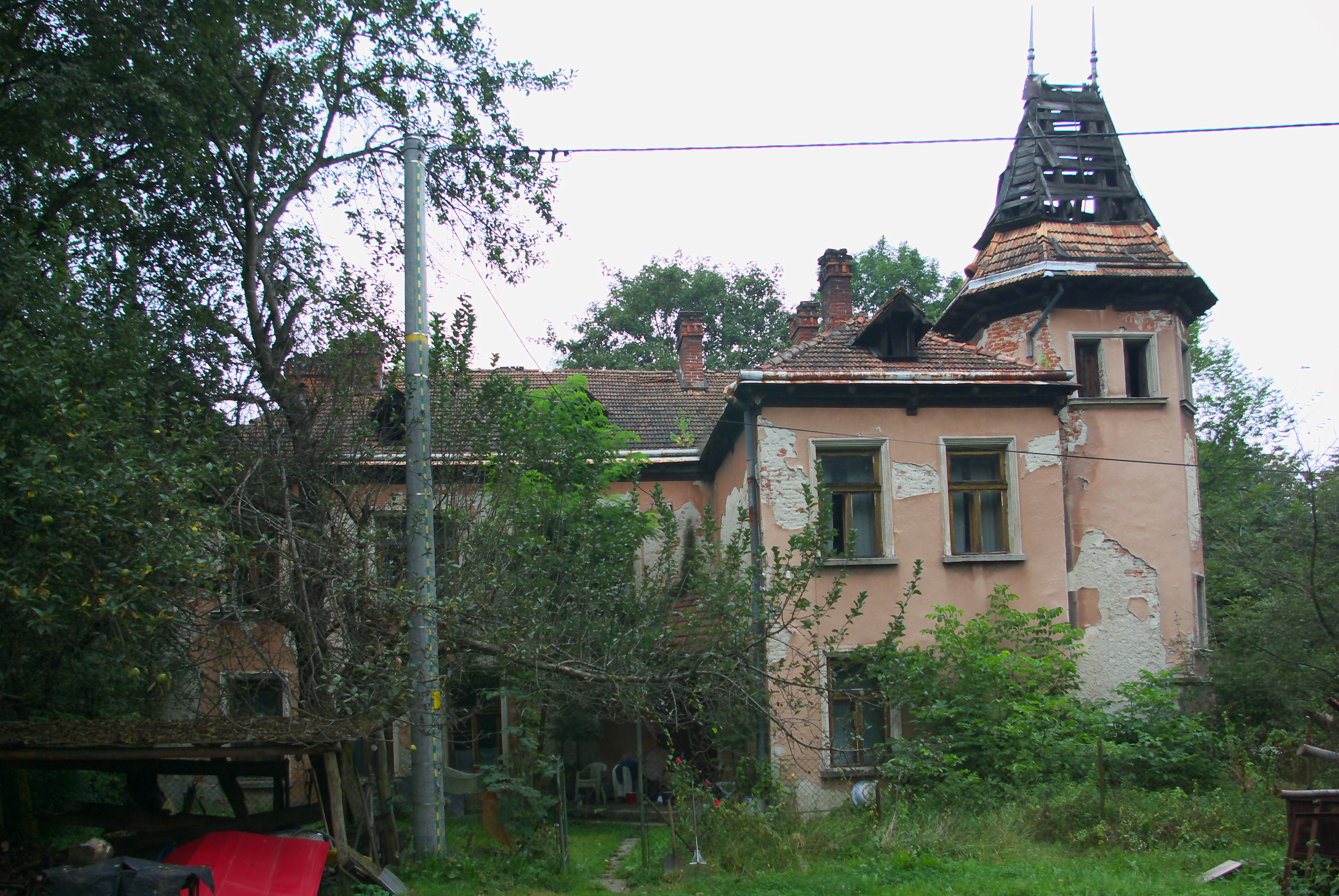 Dwór w Dolinie (Zagórz) przy ulicy Władysława Orkana 16.